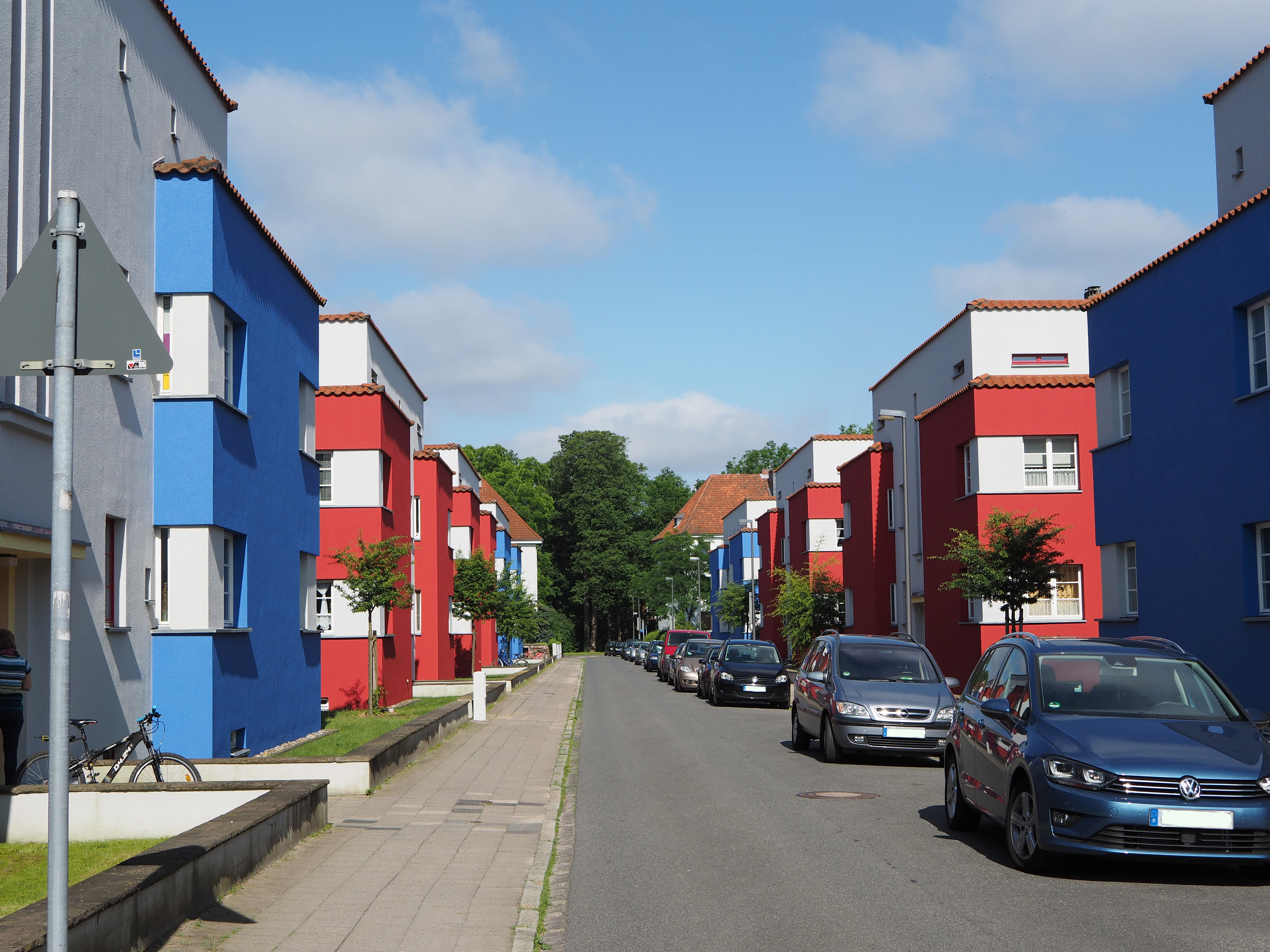 Haesler-Siedlung, Italienischer Garten, Celle (Niedersachsen)